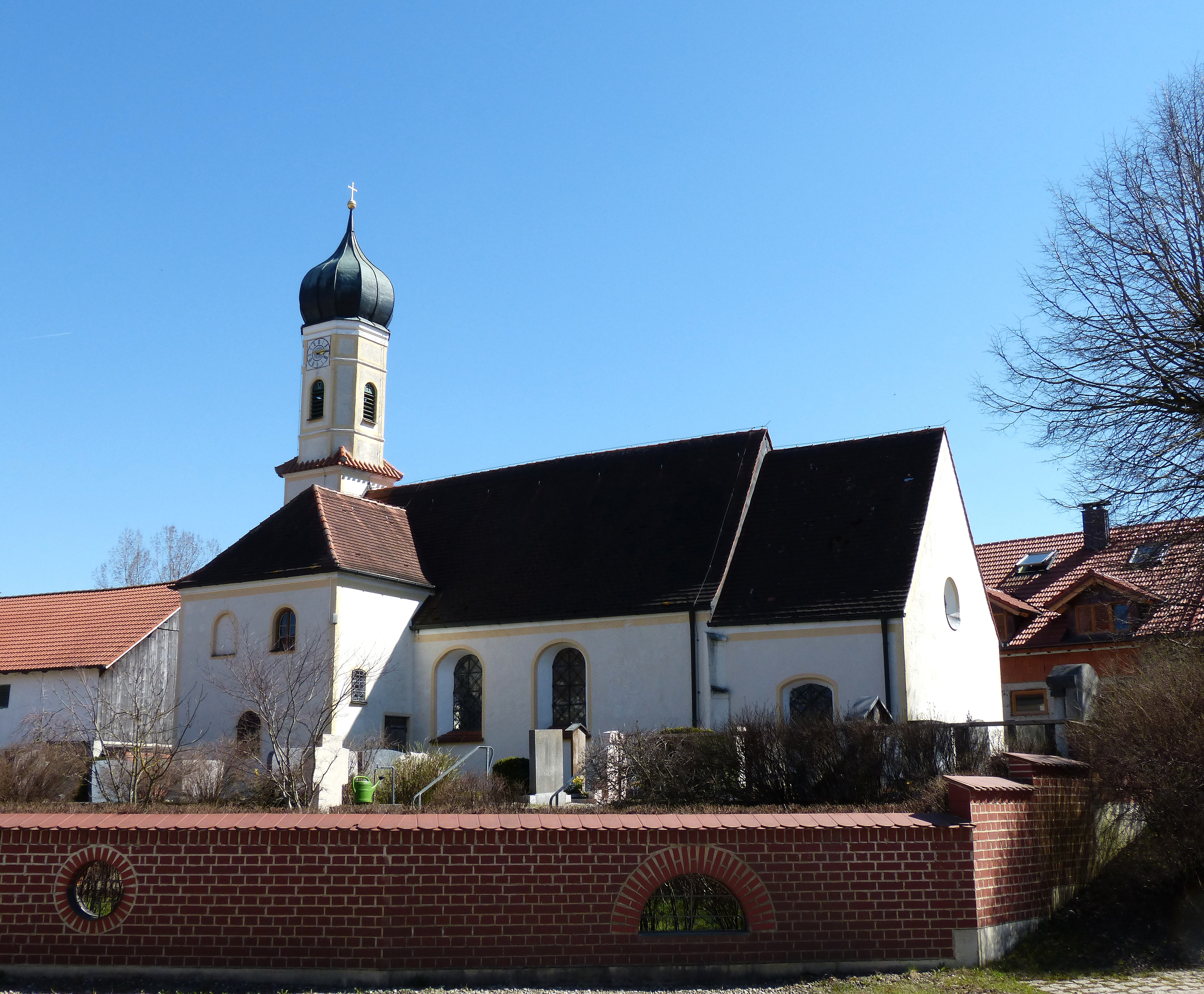 Weßling, OT Hochstadt, Kirchenstraße 1. Die wohl aus dem 15. Jahrhundert stammende Kirche St. Jakob erhielt 1752 einen auf dem Chor aufsitzenden Turm und wurde barockisiert. Das Langhaus wurde 1950 bei Renovierungsarbeiten erweitert. This is a photograph of an architectural monument.